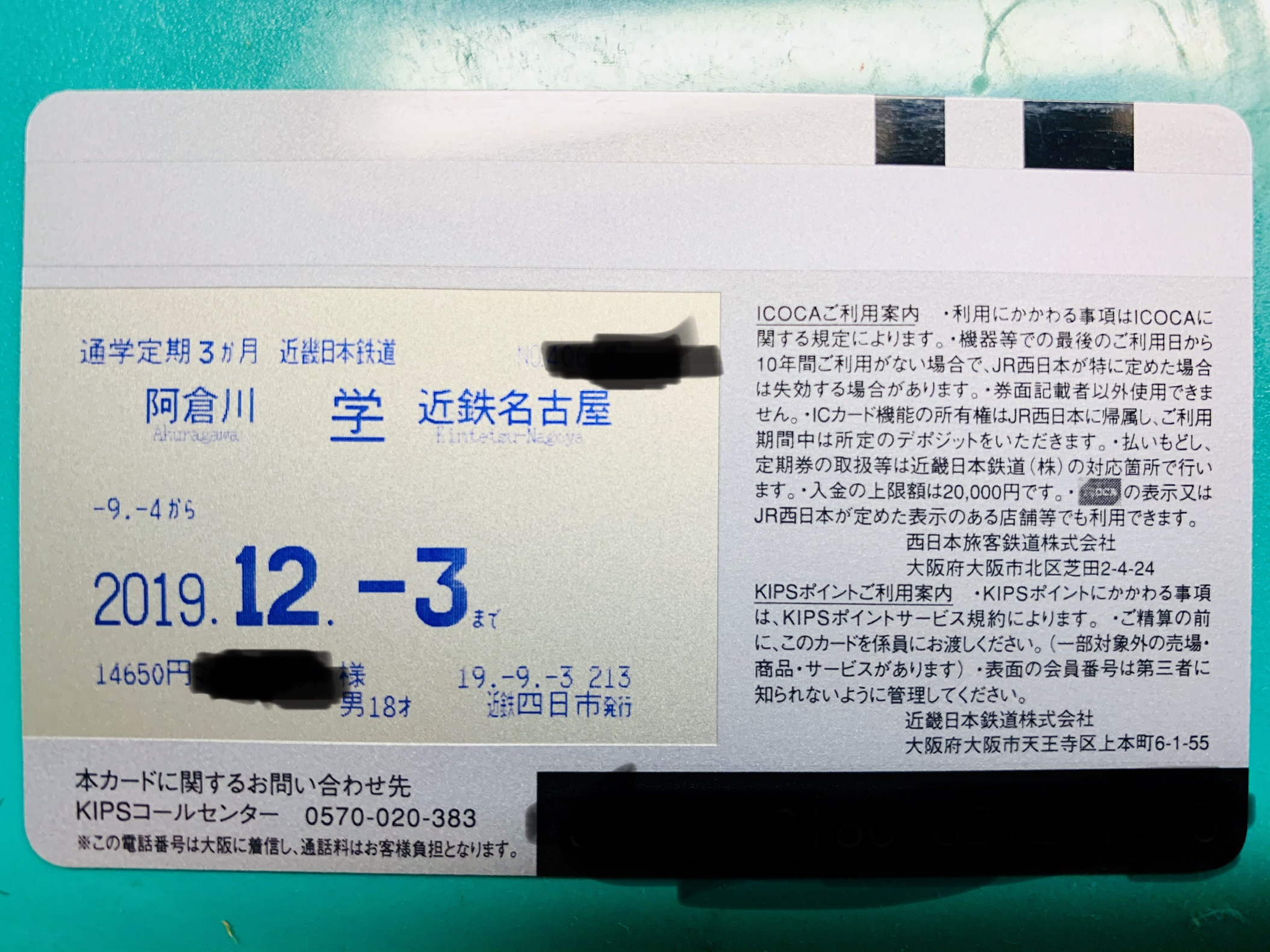 Kips ICOCAの裏面